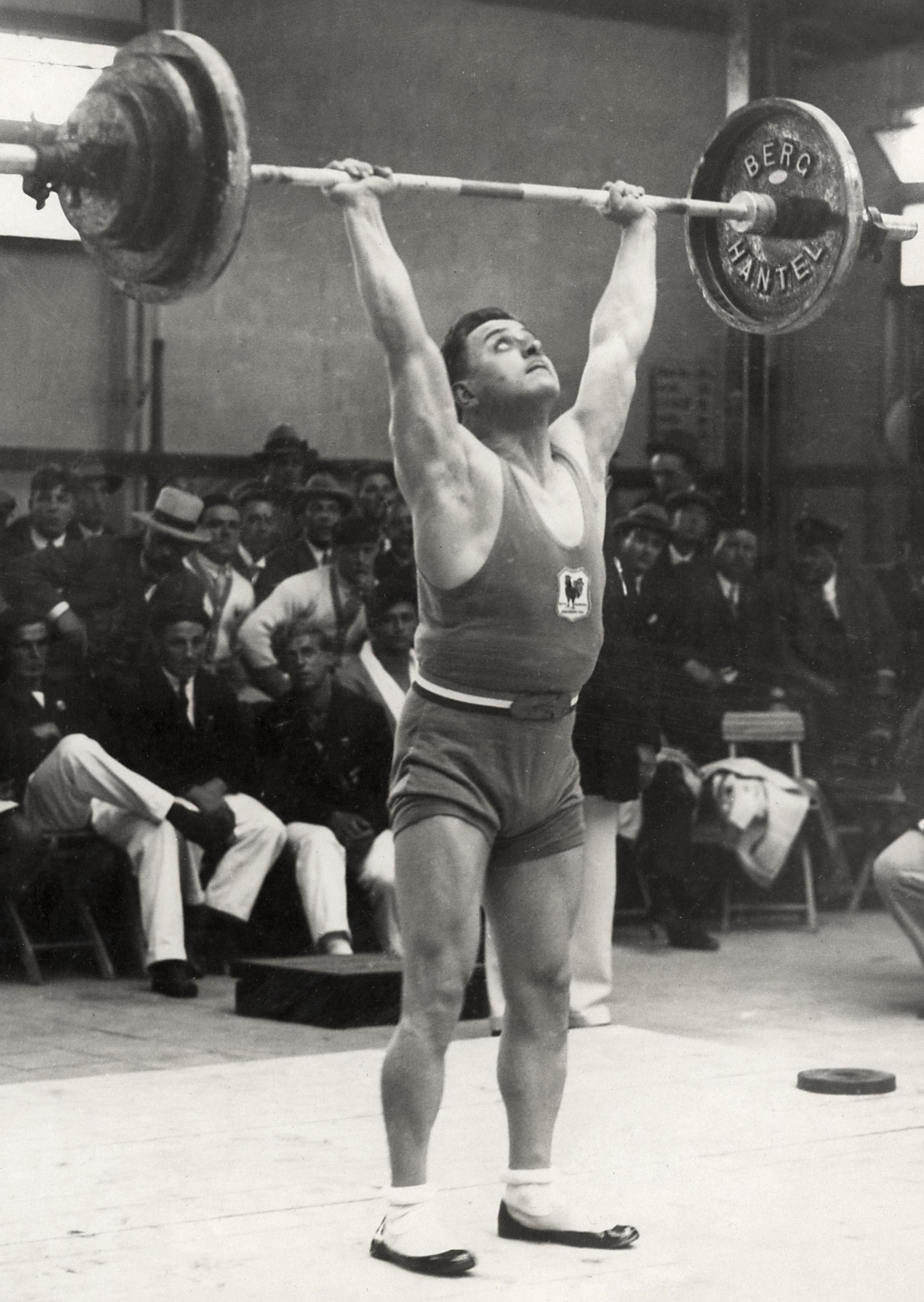 Sport, Olympische Spelen 1928, Amsterdam : De Fransman Roger Francois in actie tijdens het gewichtheffen. Hij zou olympisch kampioen worden in het middengewicht tot 75 kg.